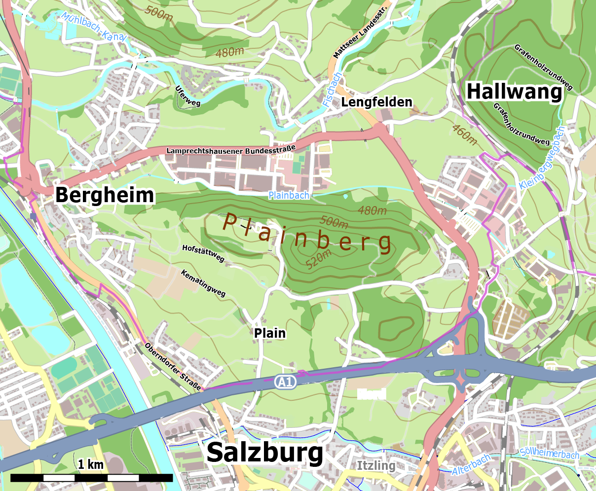 Plainberg - Übersichtskarte mit Westautobahn (A1), Abfahrt Salzburg-Nord.